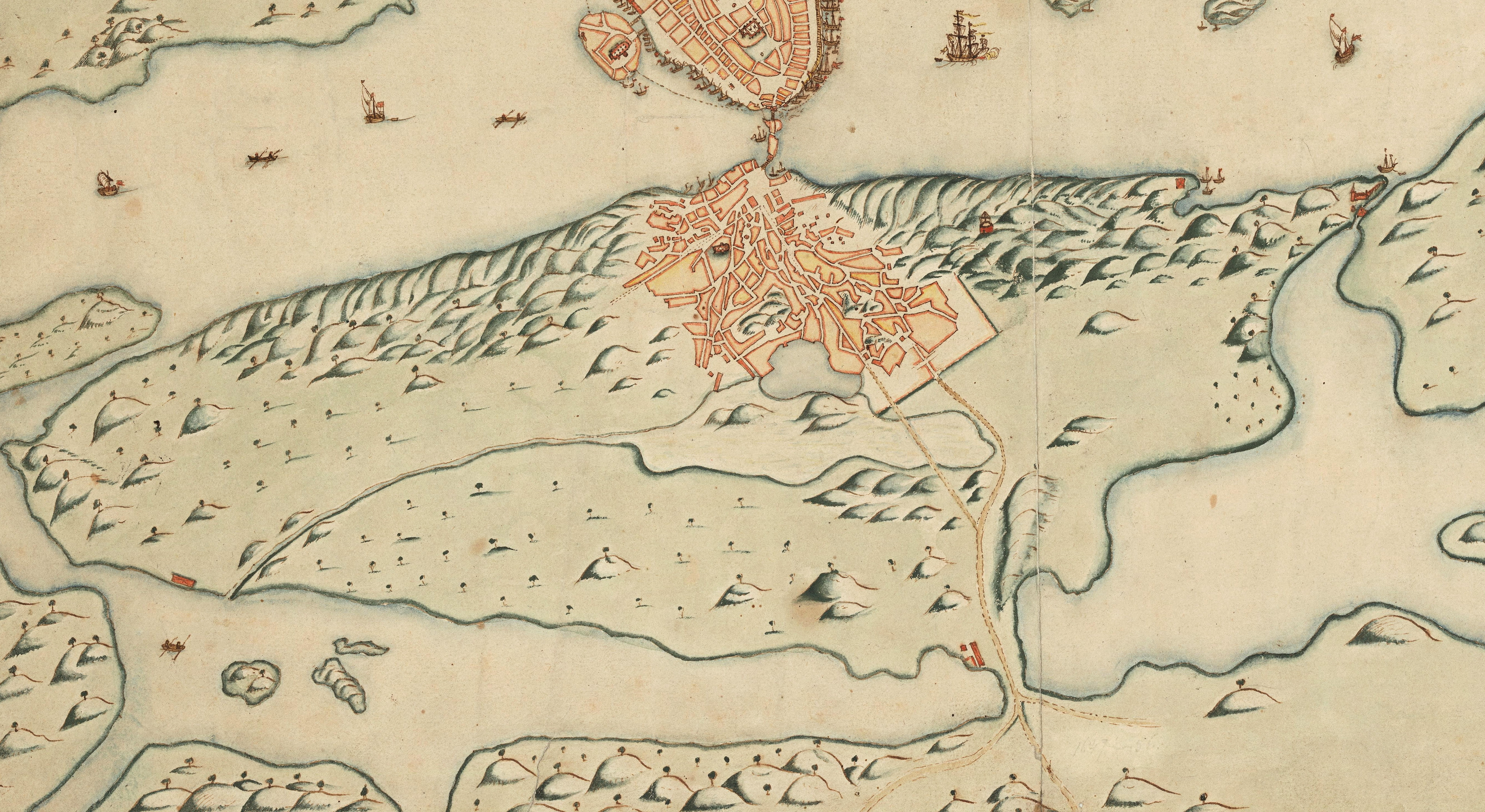 Del av Stockholmskarta visande Södermalm